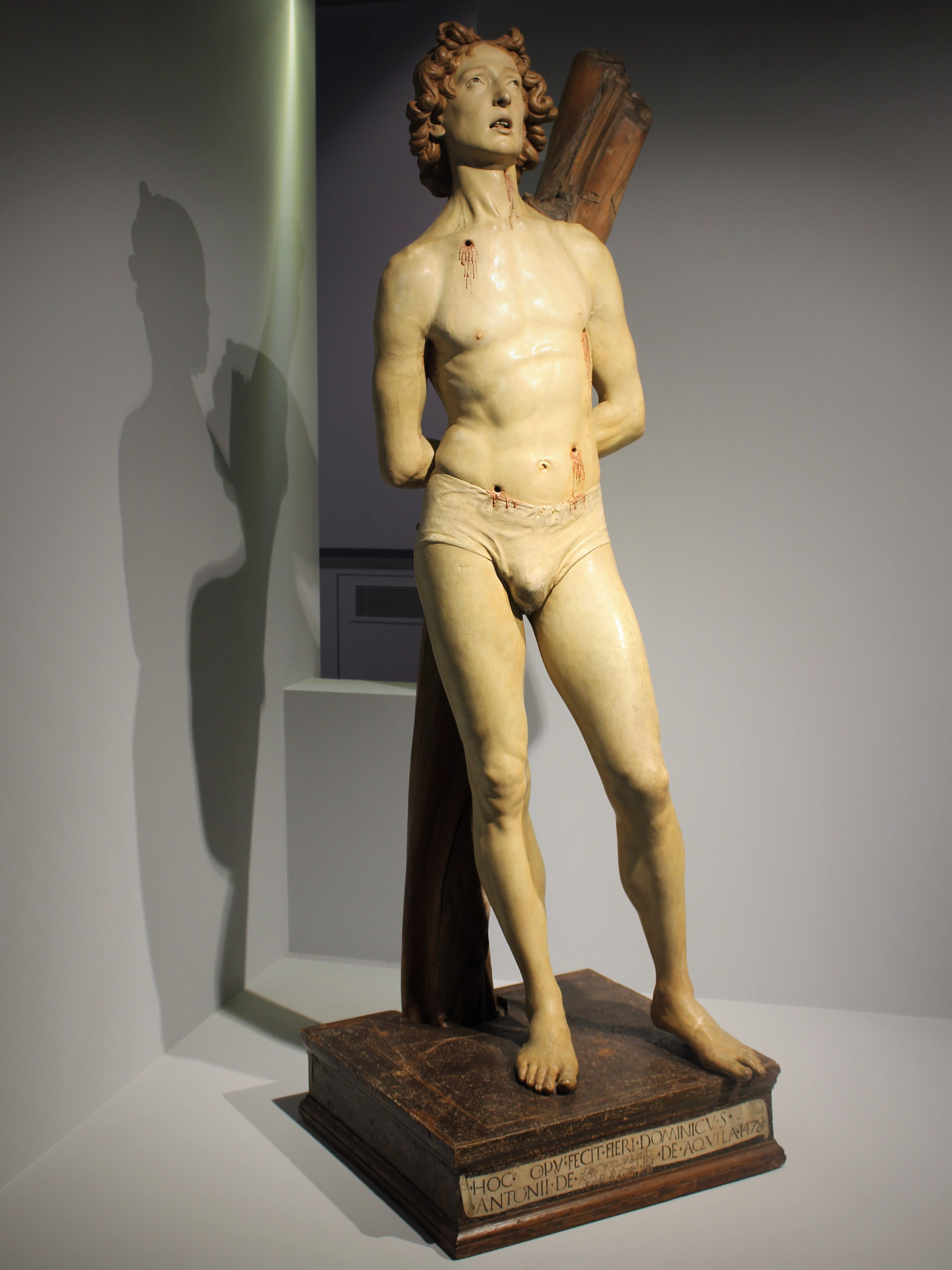 San Sebastiano (Silvestro dell'Aquila, 1478), conservato nel museo nazionale d'Abruzzo in L'Aquila.